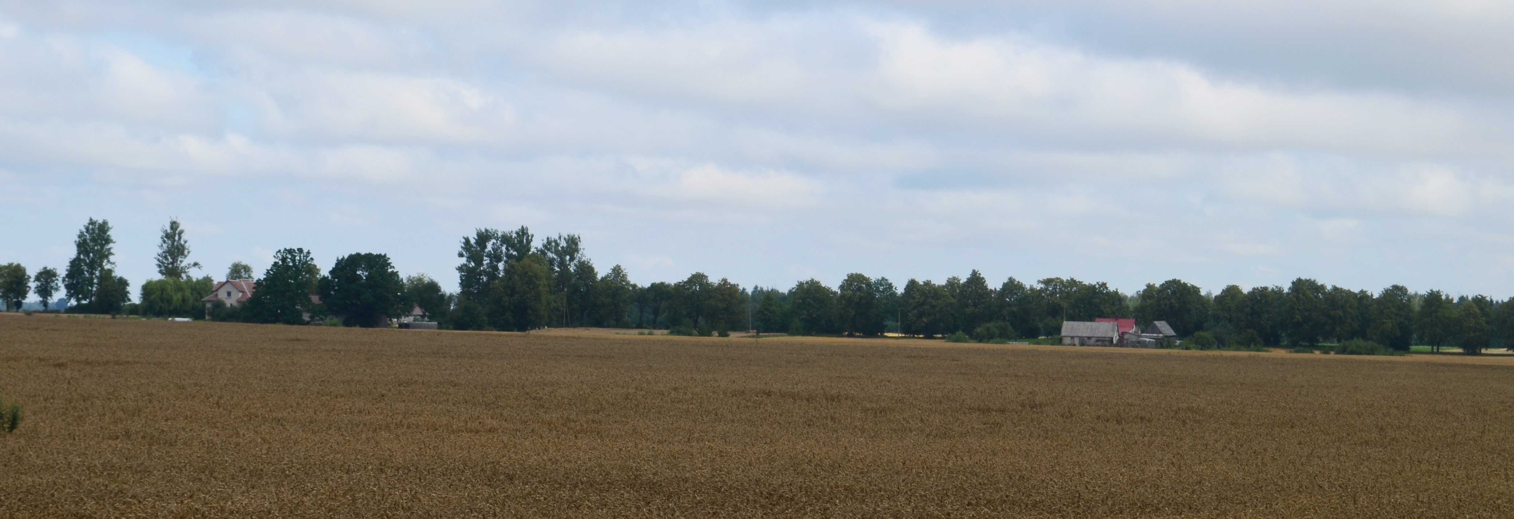 Paduobiai, Jonavos raj.